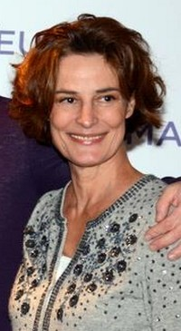 Laure Killing à l'avant-première du film "Avant l'hiver"